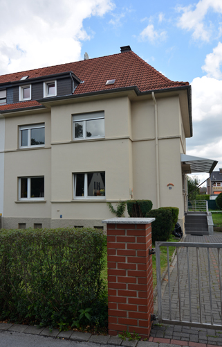 Stolpersteine Dortmund